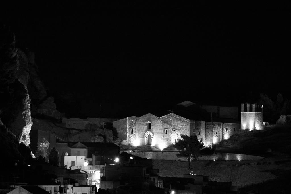 Caltabellotta (AG)